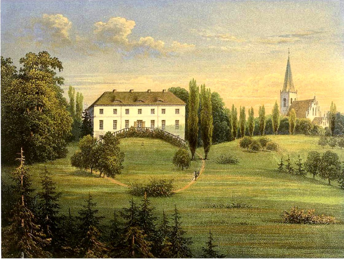 Rittergut Vietnitz, Kreis Königsberg